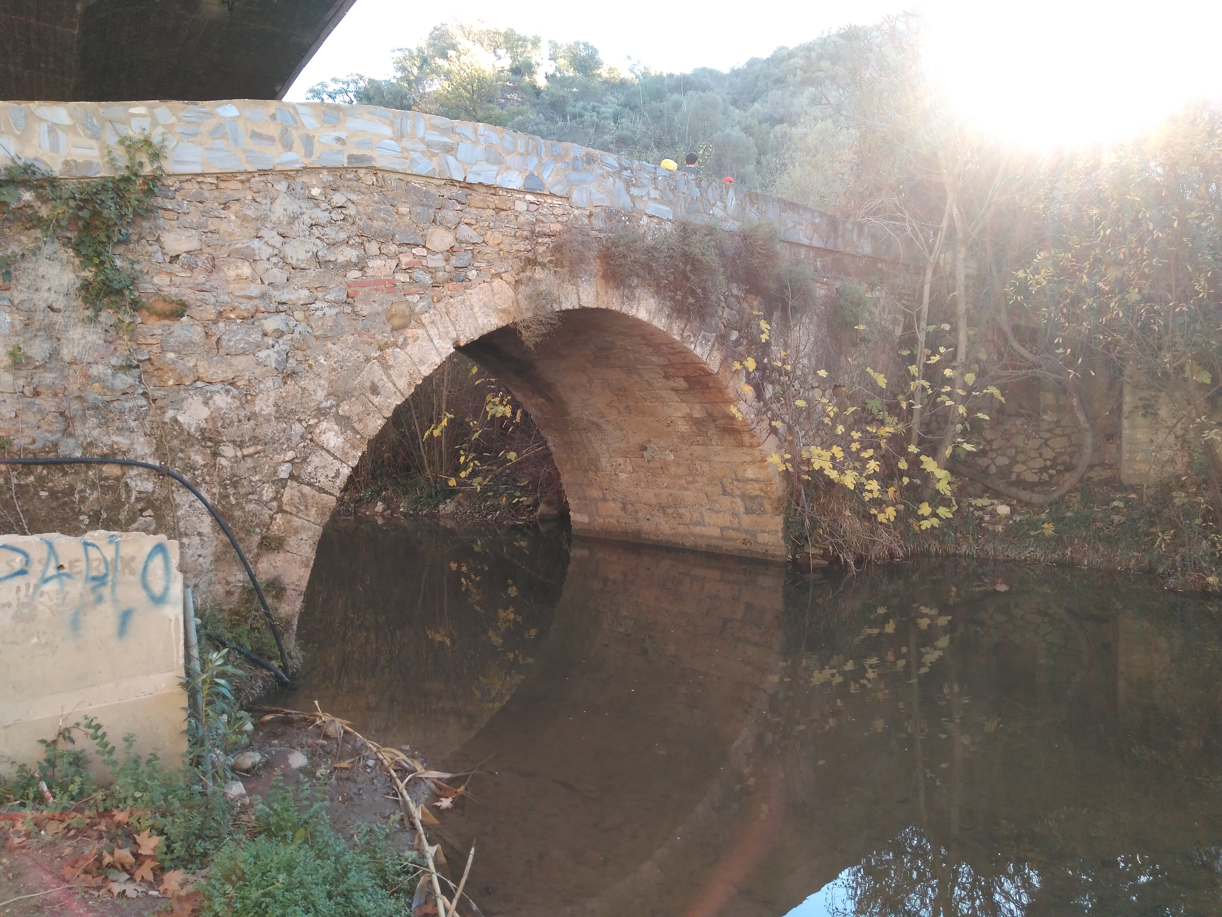 Puente sobre el río Tavizna en el núcleo de Tavizna (Ubrique, España)